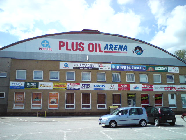 Plus Oil Aréna